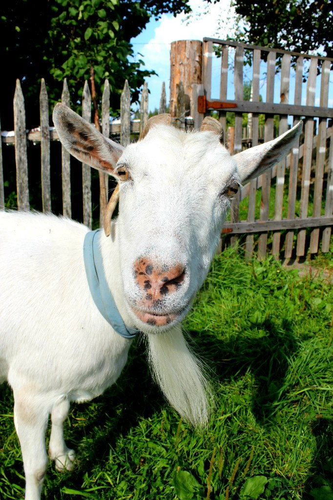 популярный персонаж д. Введеньё